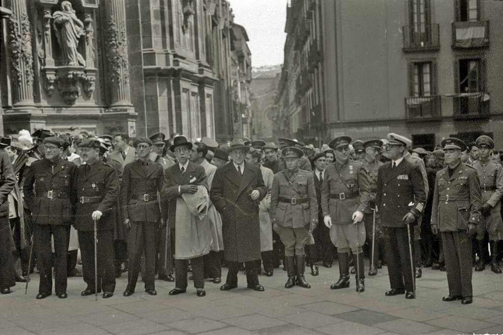 Título original: Acto en homenaje a José Antonio Primo de Rivera (4/12) Localización: San Sebastián (Guipúzcoa)